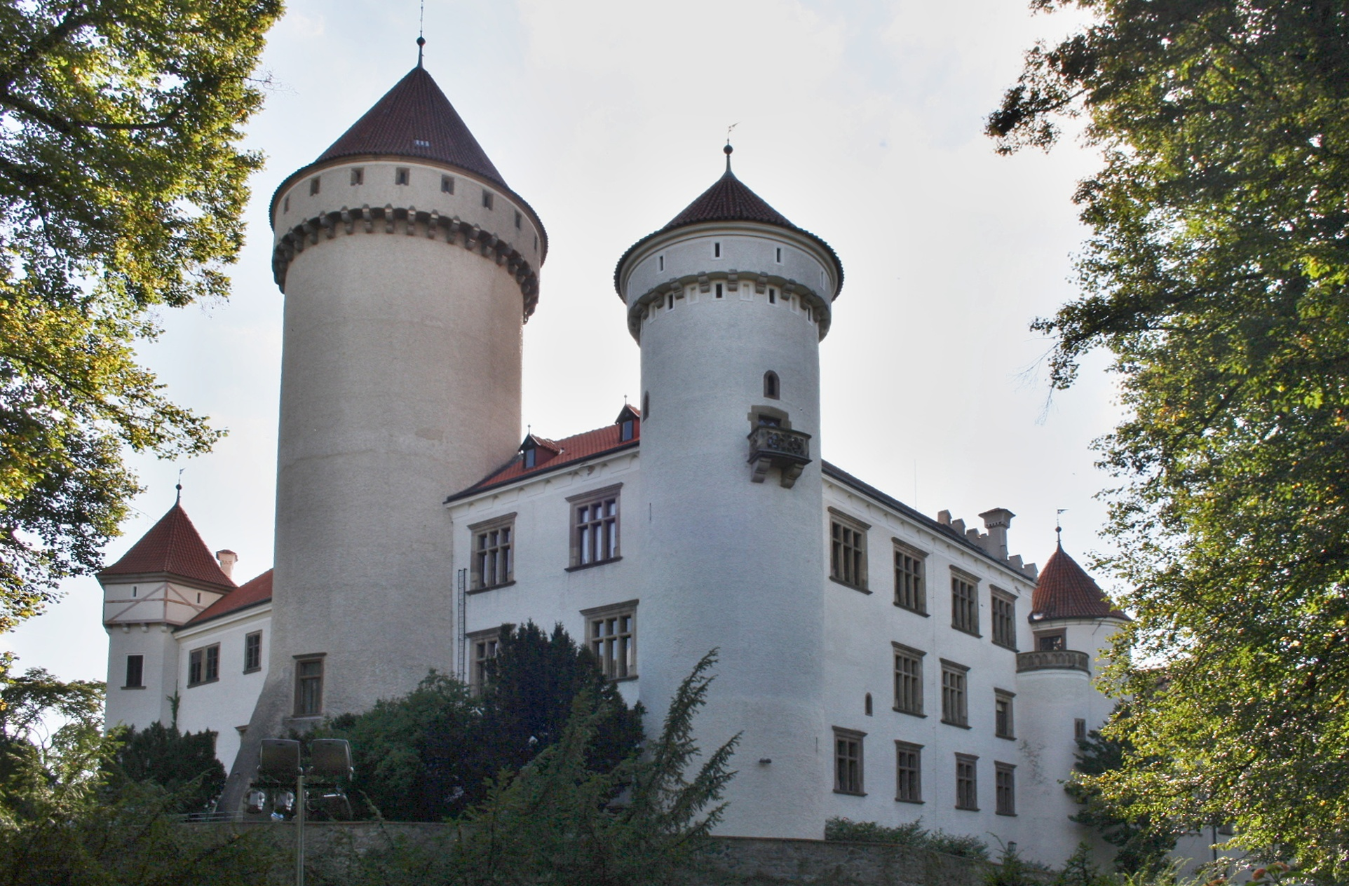 Zámek Konopiště, Benešov 1, Benešov.